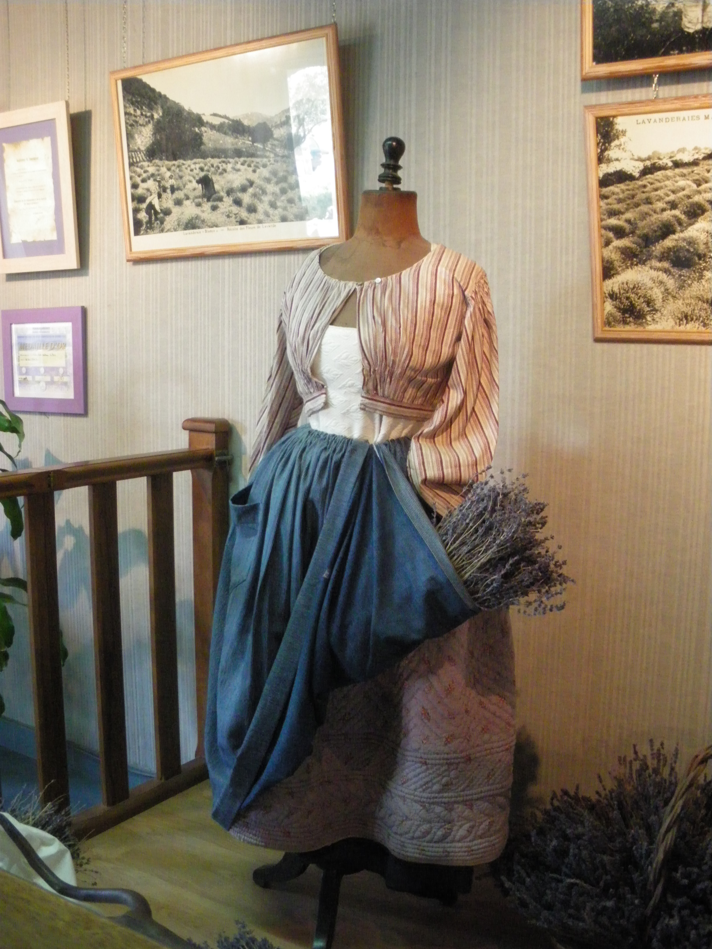 Ramasseuse de lavande en Provence, musée de la lavande de Coustellet